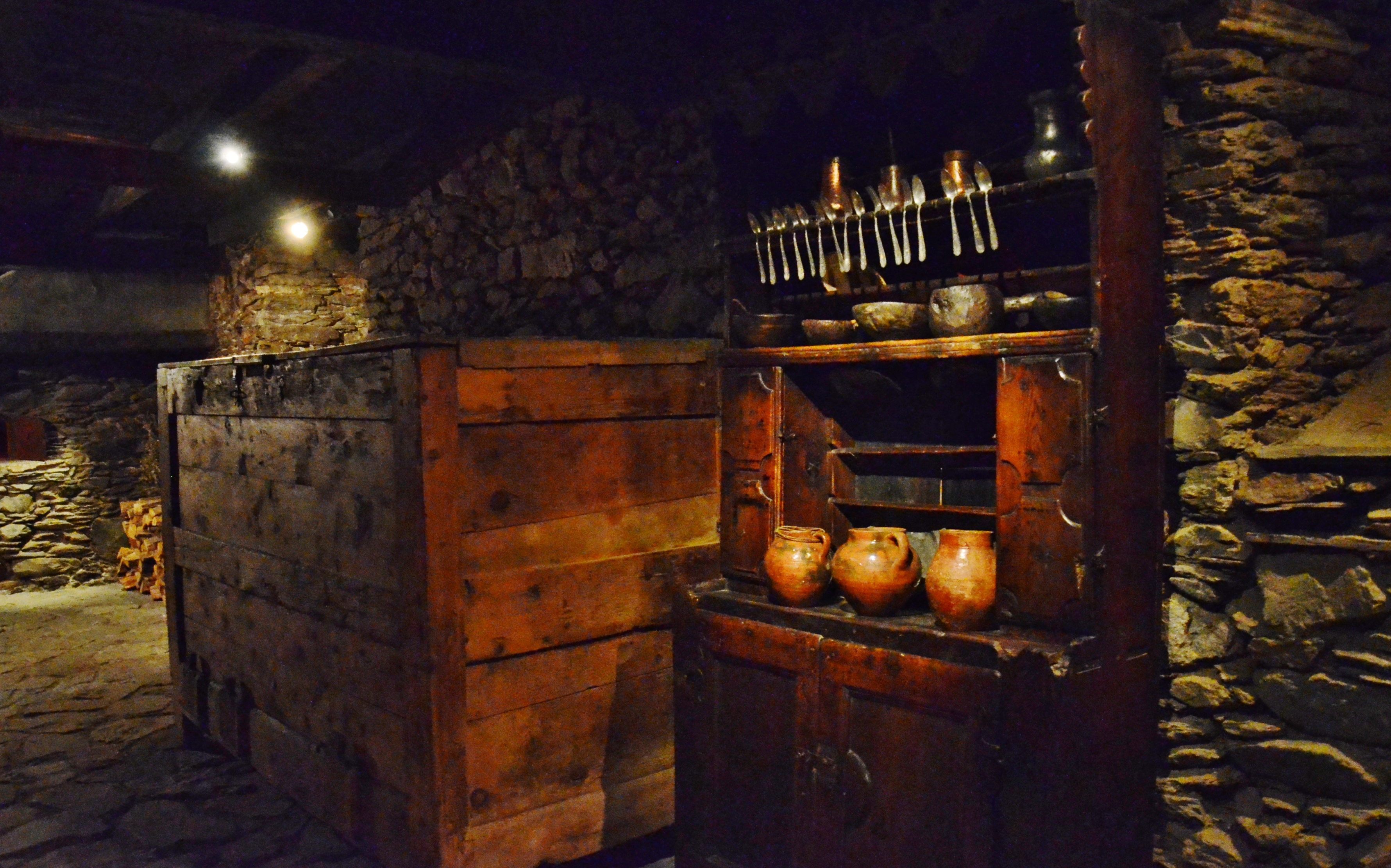 Casa Rull (la Massana)